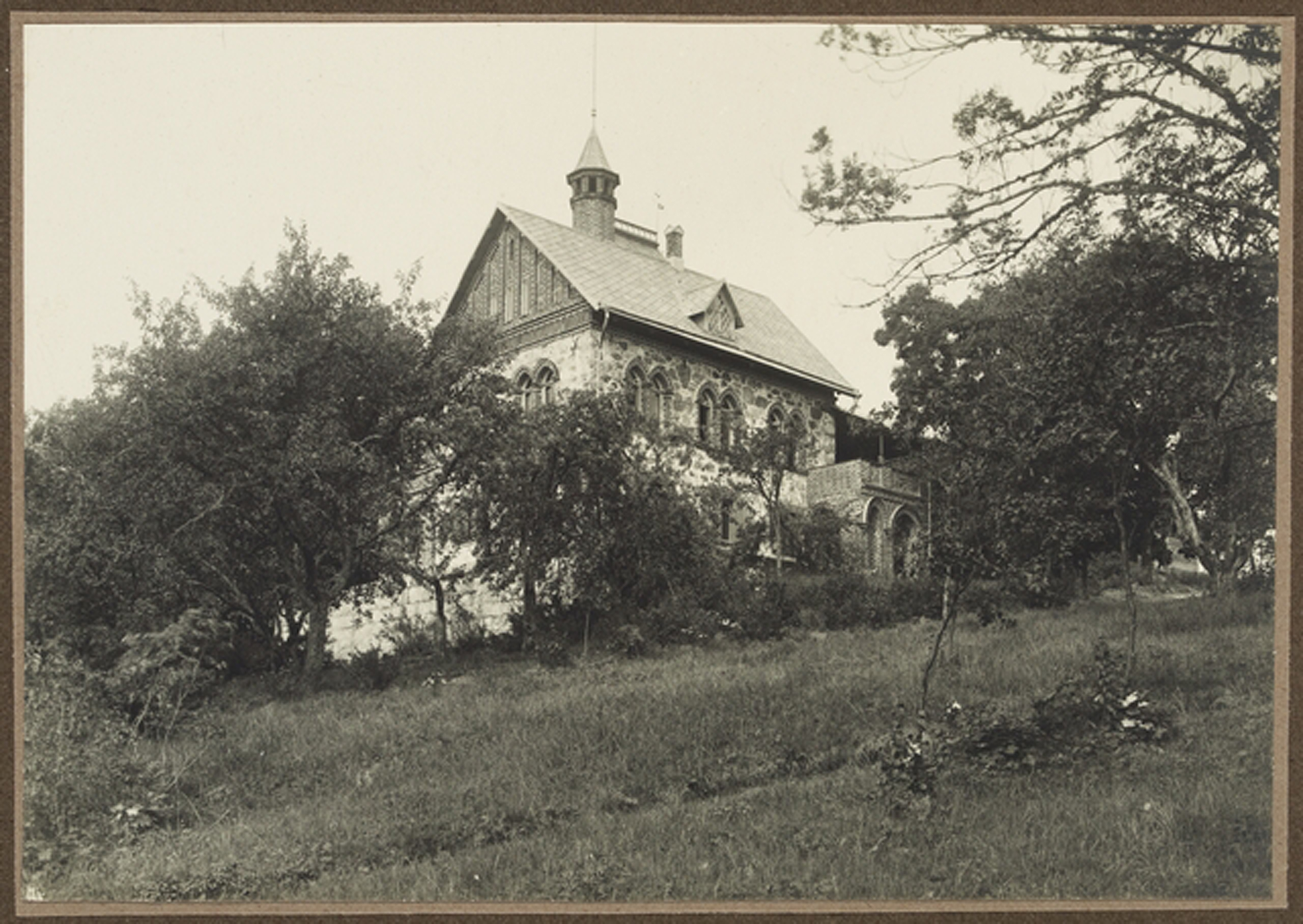 Vuorentaan kartano